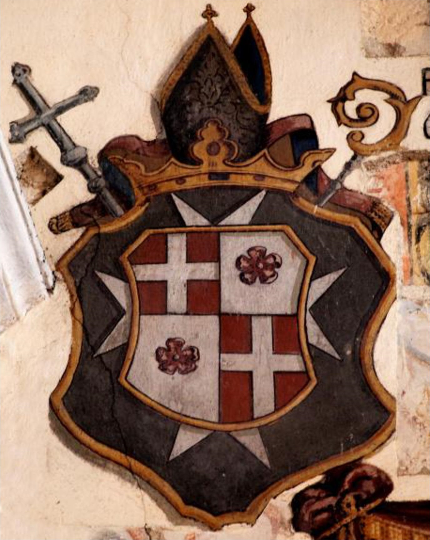 Erb Jošta II. z Rožmberka jako generálního převora johanitského řádu – nástěnná malba v kostele sv. Prokopa ve Strakonicích.